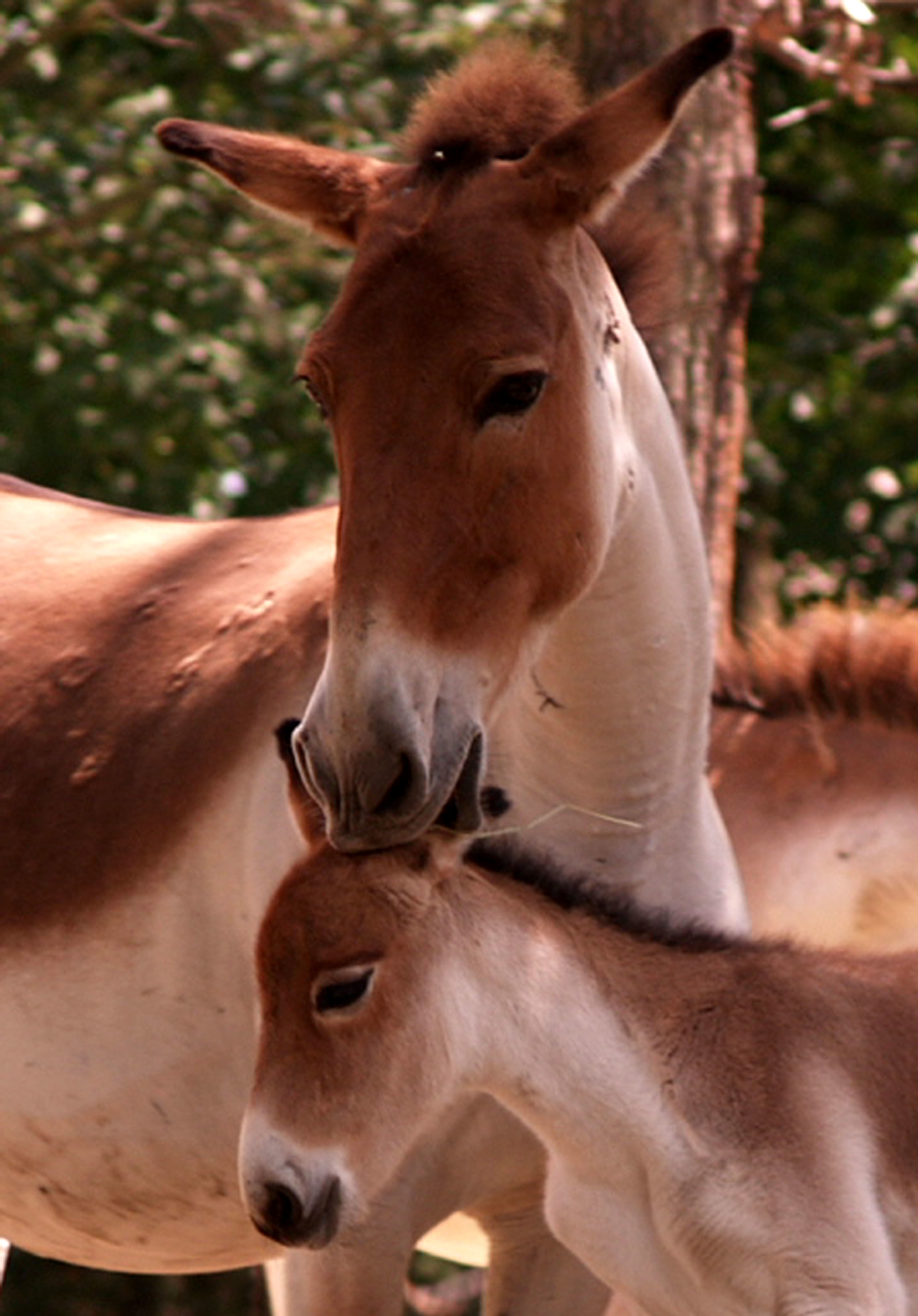 Kiang